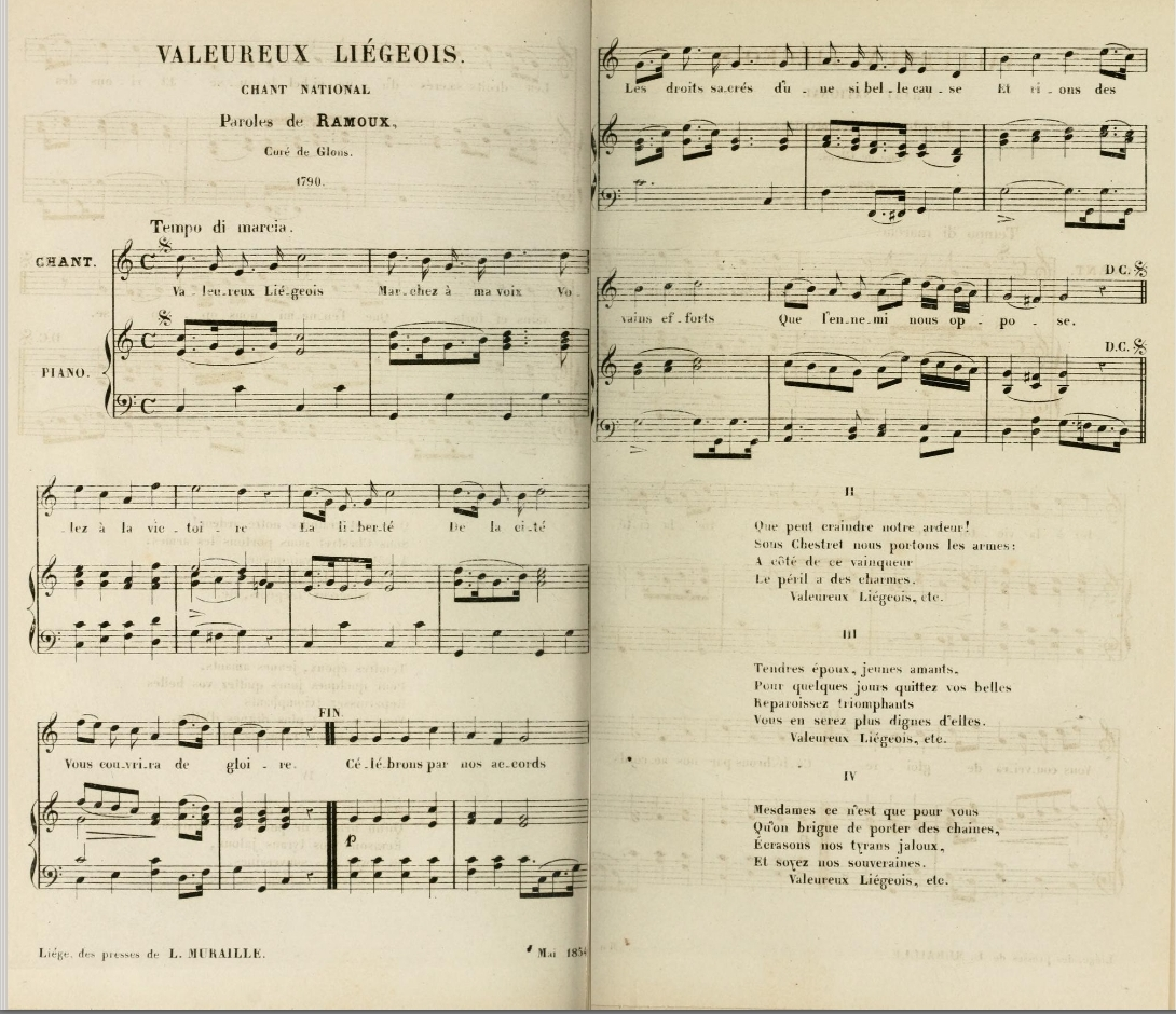 Chant national liégeois, paroles de Ramoux, curé de Glons, 1790